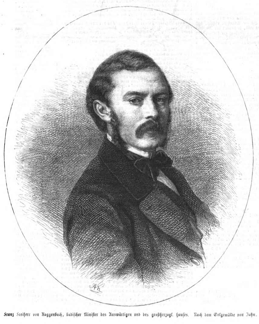 Franz Freiherr von Roggenbach, badischer Minister des Auswärtigen, 1862.